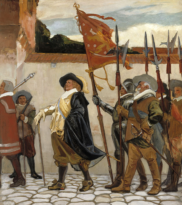 Albert Edelfelts painting Turun akatemian vihkiäiset (part 2/3).